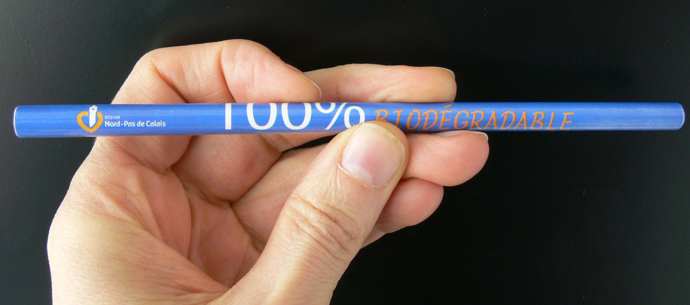 Crayon "biodégradable" dont le corps est constitué de papier enroulé autour de la mine. Il se taille comme un crayon normal.